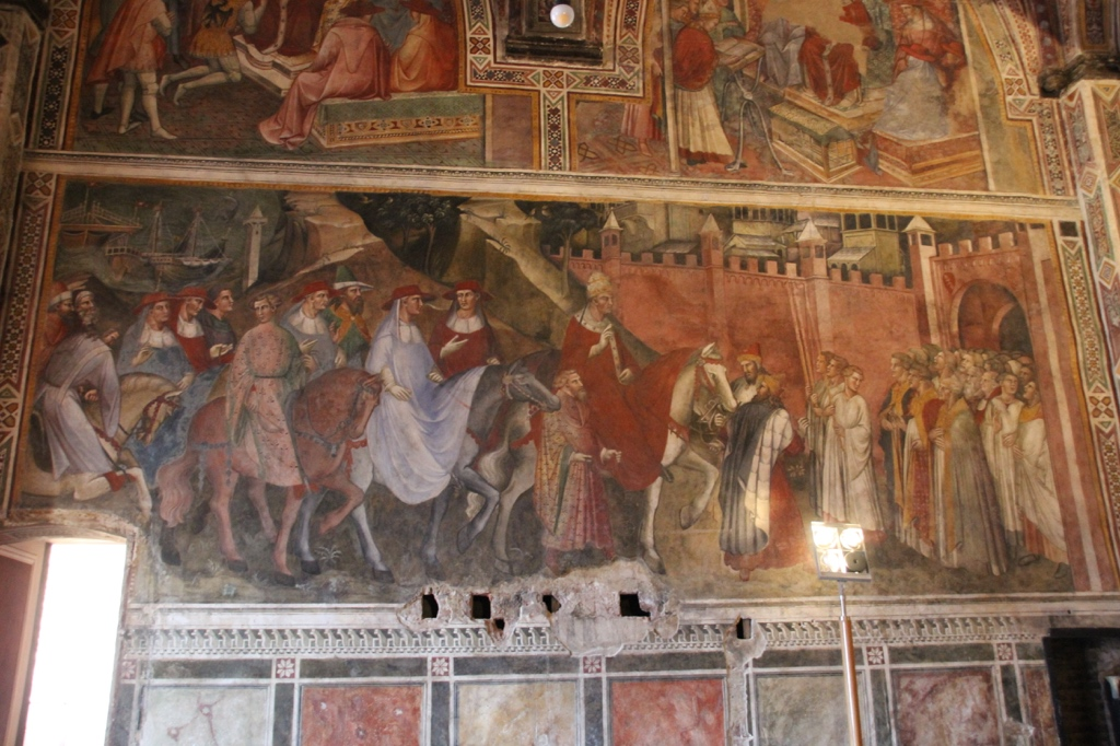 Siena_Palazzo Pubblico